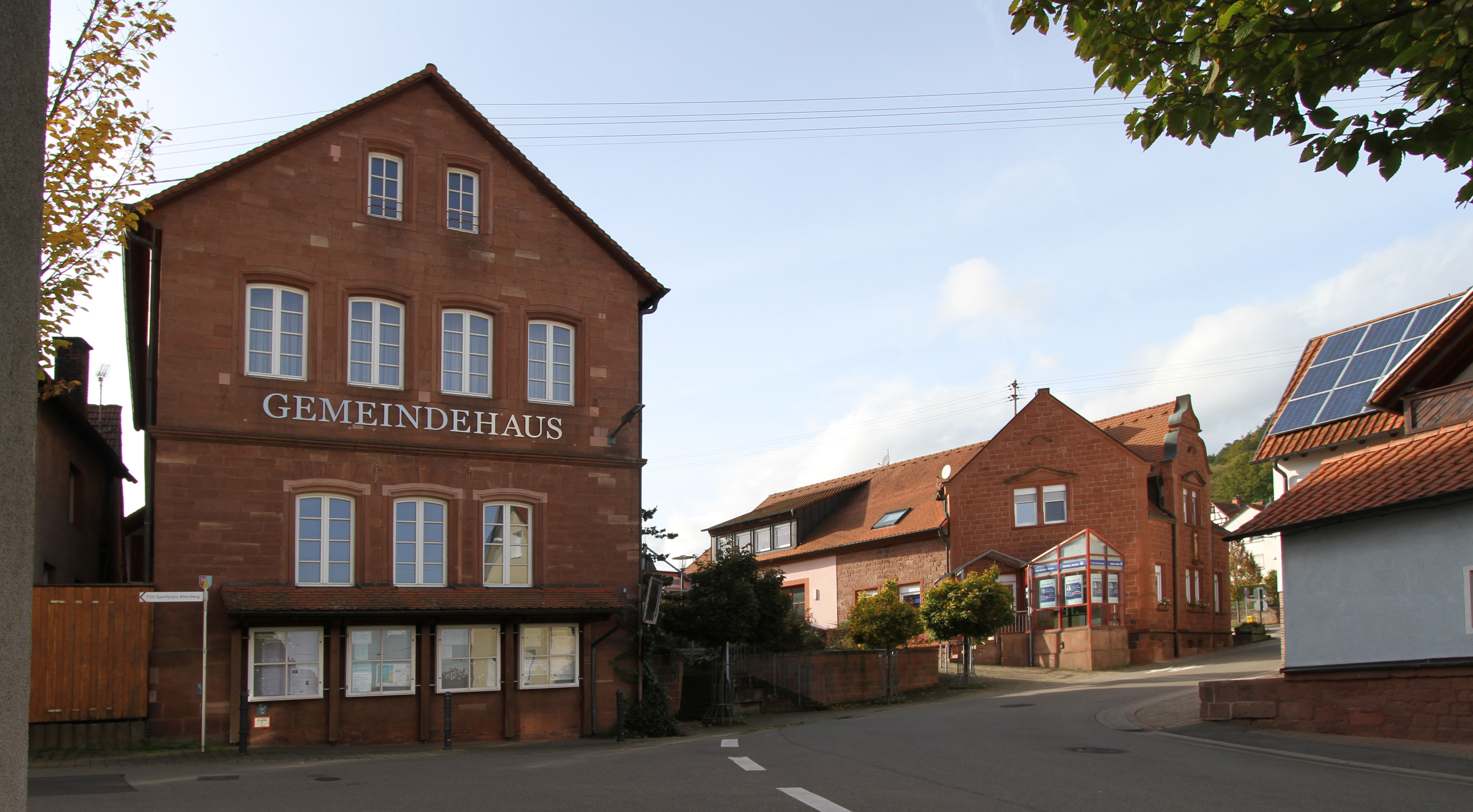 Wernersberg